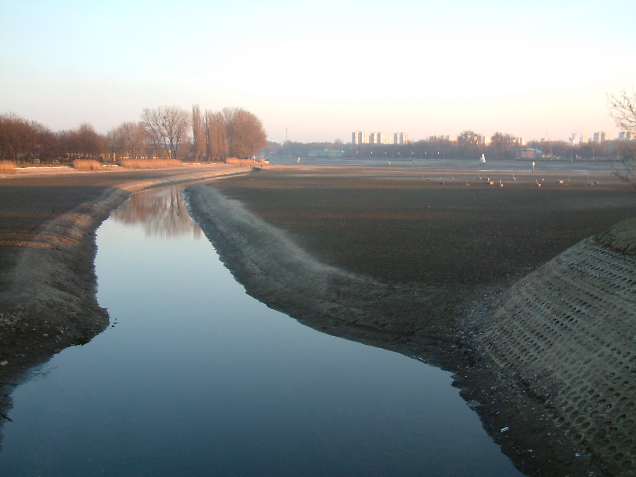 Dno Malty